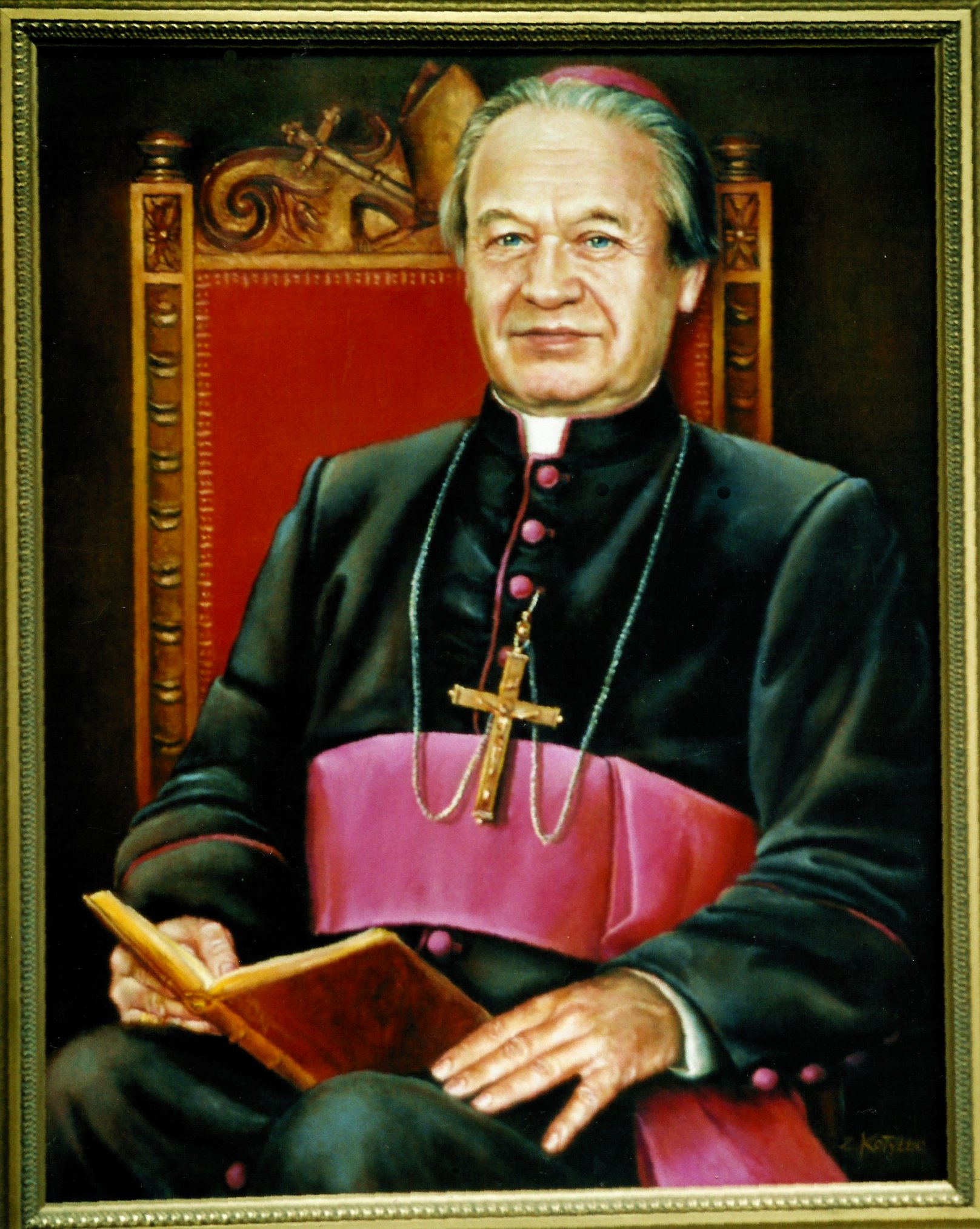 Wacław Świerzawski Malował Zbigniew Kotyłło